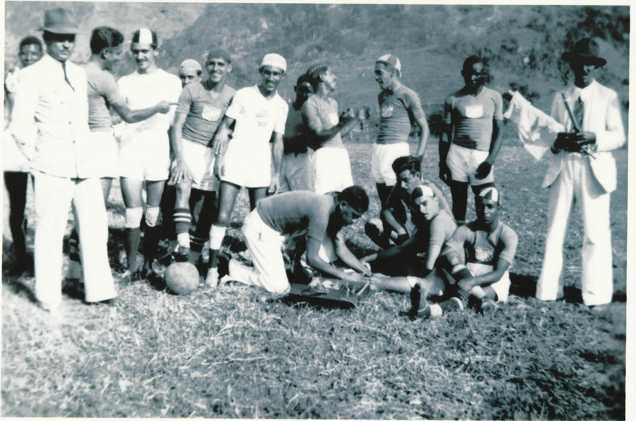 Floresta Cambuci